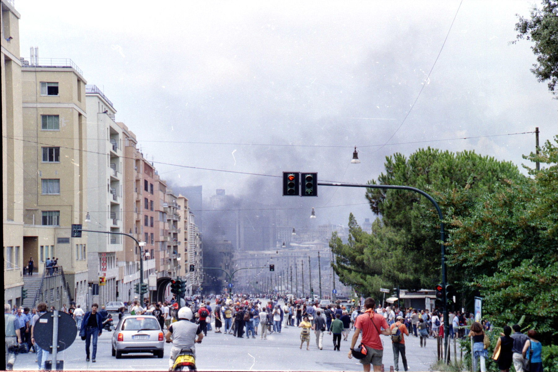 Genova - Fatti del G8 del 20 luglio 2001 Cariche della polizia a Corso Gastaldi